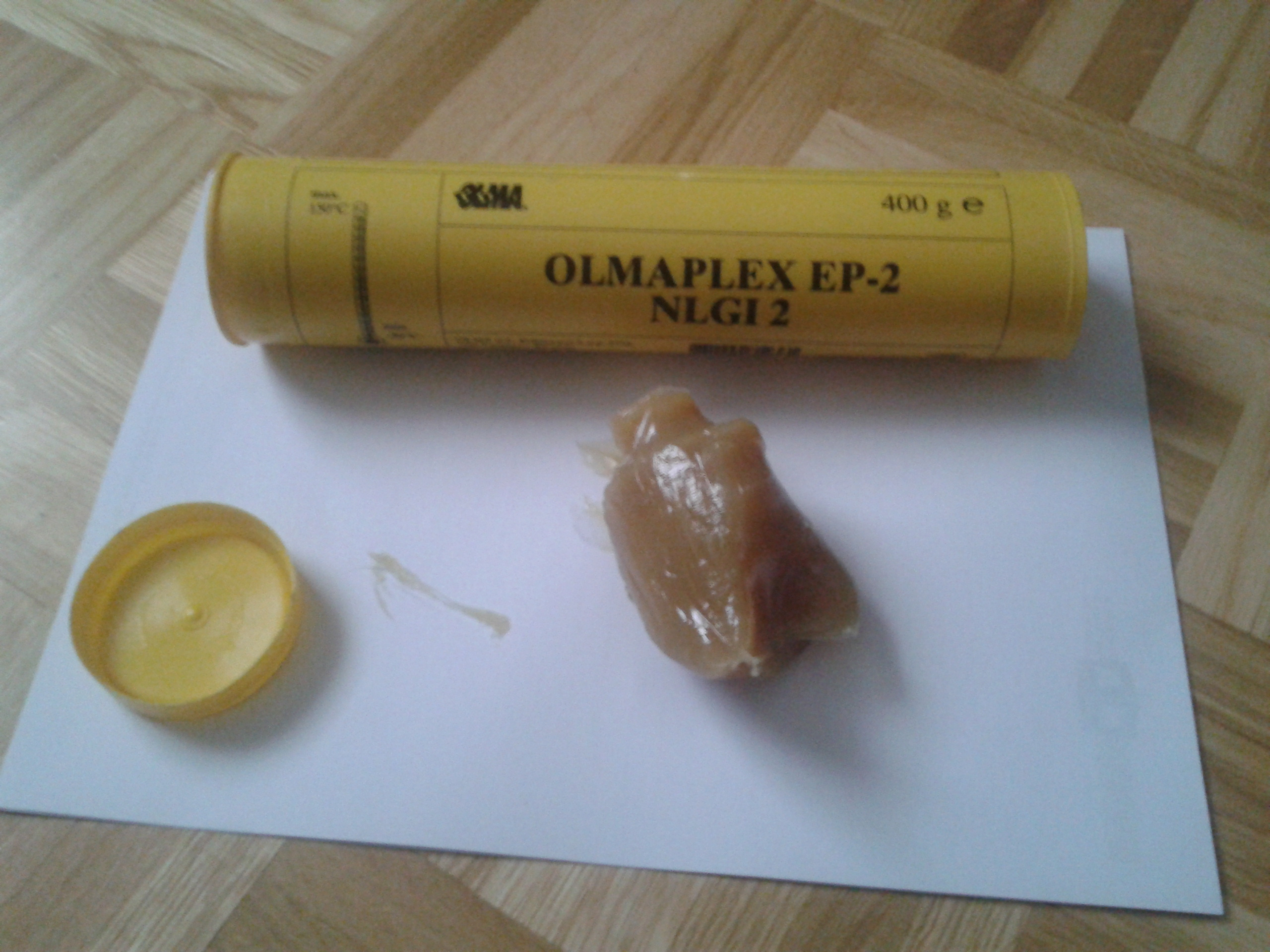 Mast za podmazovanje, proizvajalca Olma.